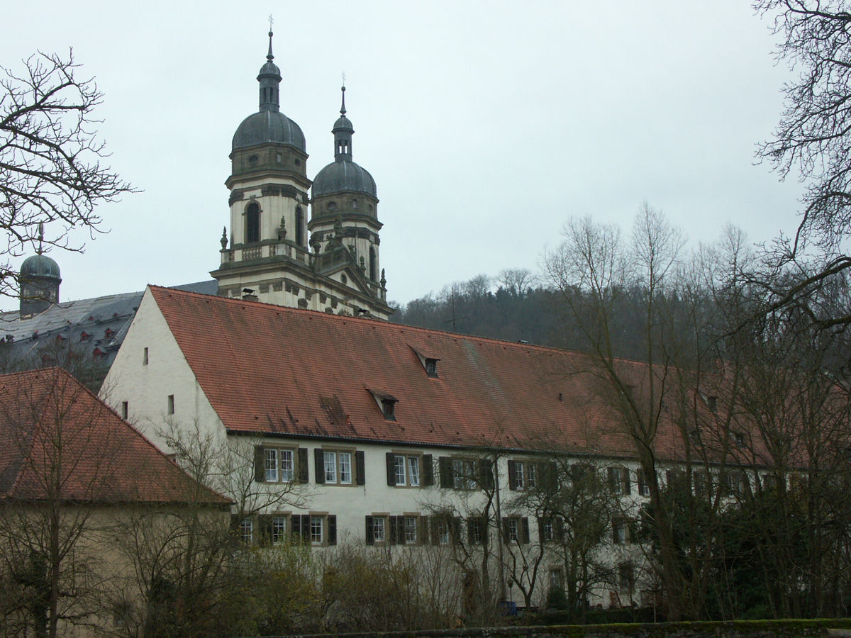 Schöntal Abbey, Schöntal, Germany